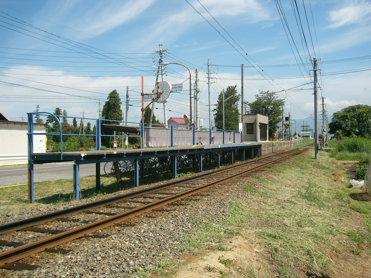 Samizo Station